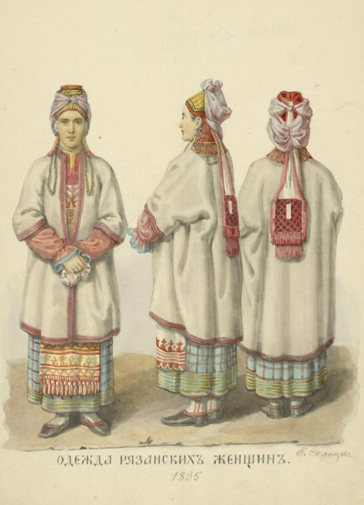 Солнцев Ф. Г. Одежда рязанских женщин, 1835 год. «Одежды Русского государства».